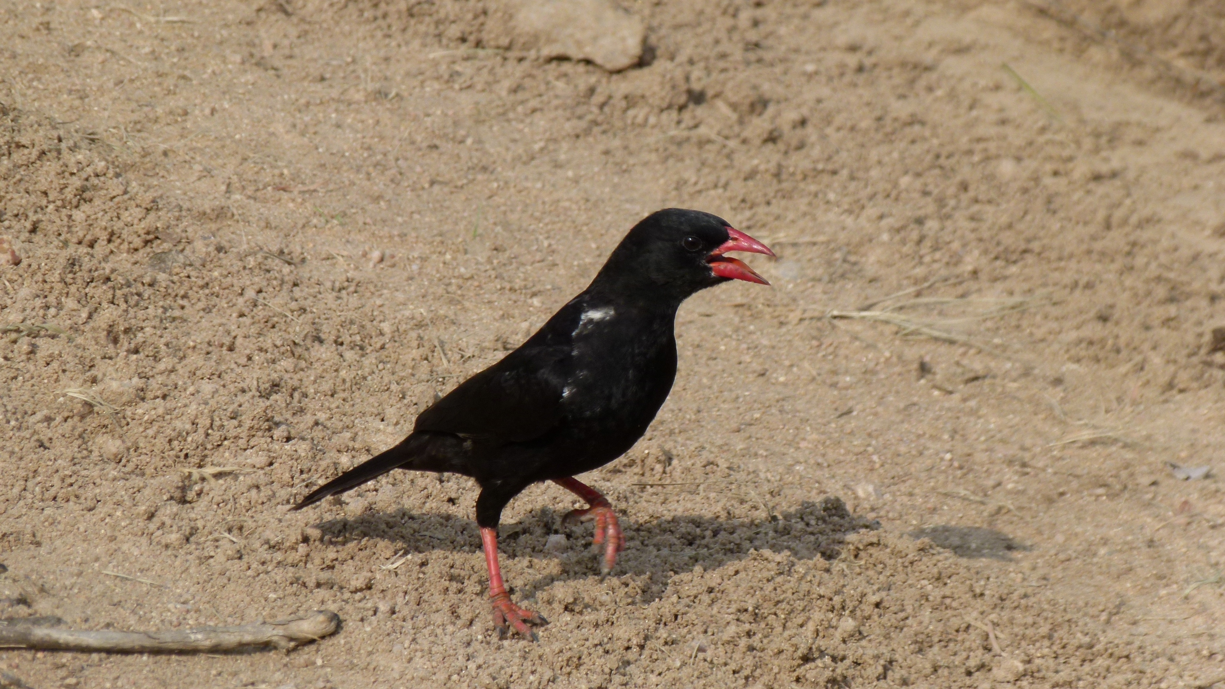 S32 near Tshokwane, Kruger NP, SOUTH AFRICA